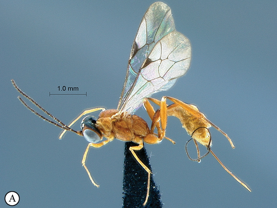 Schlupfwespe =(Ichneumonidae), Cremastinae, Pristomerus mboum, Holotypus aus der Originalbeschreibung, Habitus von lateral, aus Südafrika